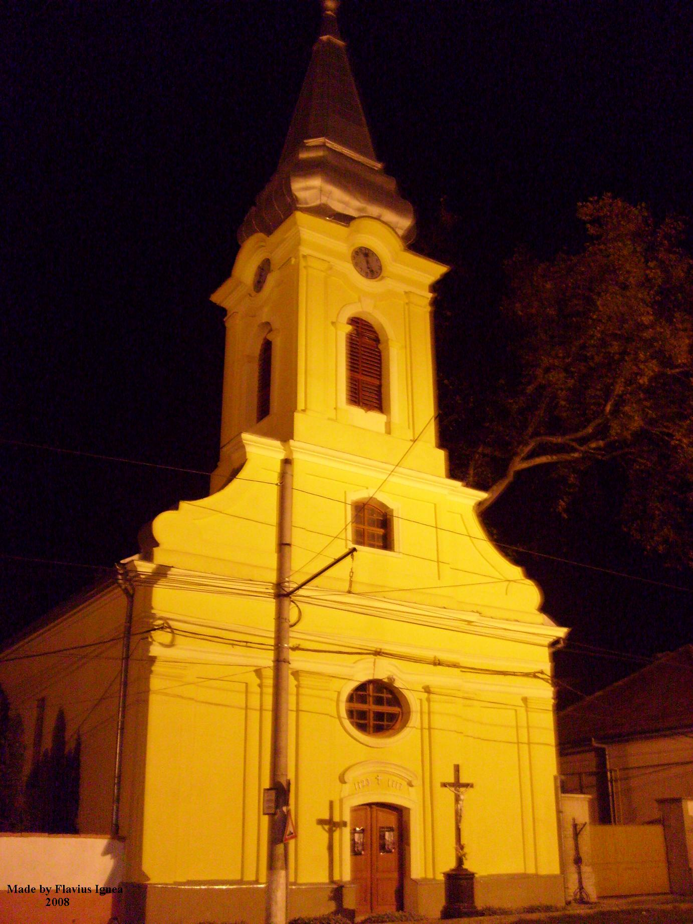 Biserica Romano-Catolica din Freidorf noaptea